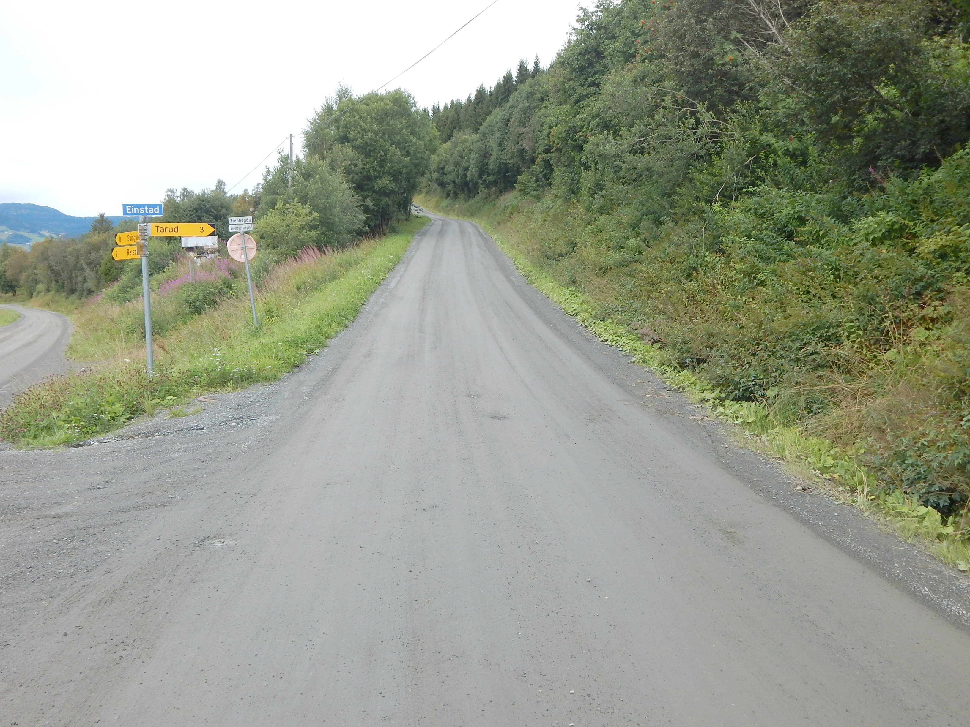 Sørenden av Treahøgda (fylkesvei 2548, tidl. 339) ved Øverbygdsvegen (fylkesvei 2530), på Einstad